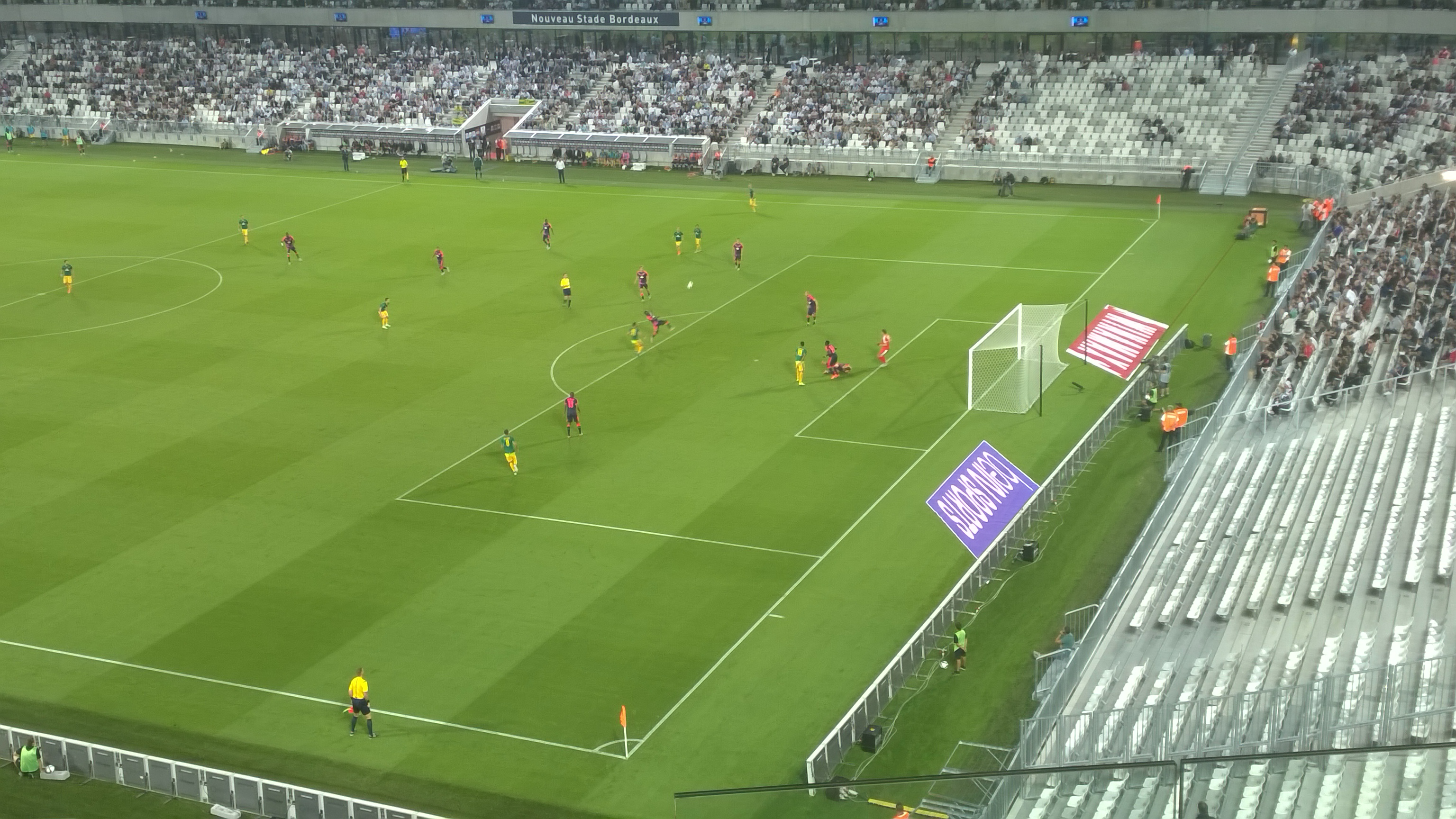 Match de football entre les Girondins de Bordeaux et l'AEK Larnaca pour le compte du tour préliminaire de l'Europa Ligue 2015-2016 au Nouveau Stade de Bordeaux.